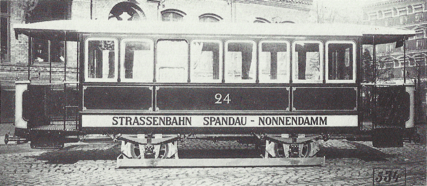 Werksfoto des Beiwagens 24 der Elektrischen Straßenbahn Spandau–Nonnendamm bei den Fahrzeugwerkstätten Falkenried